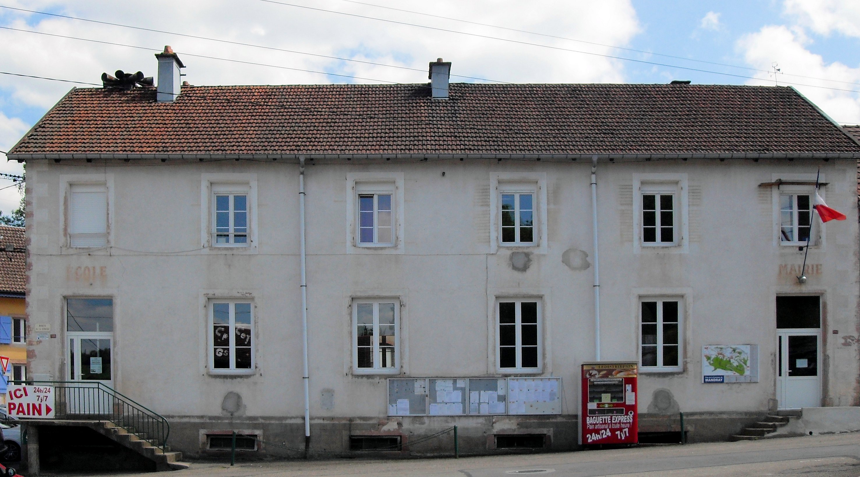 La mairie-école de Mandray